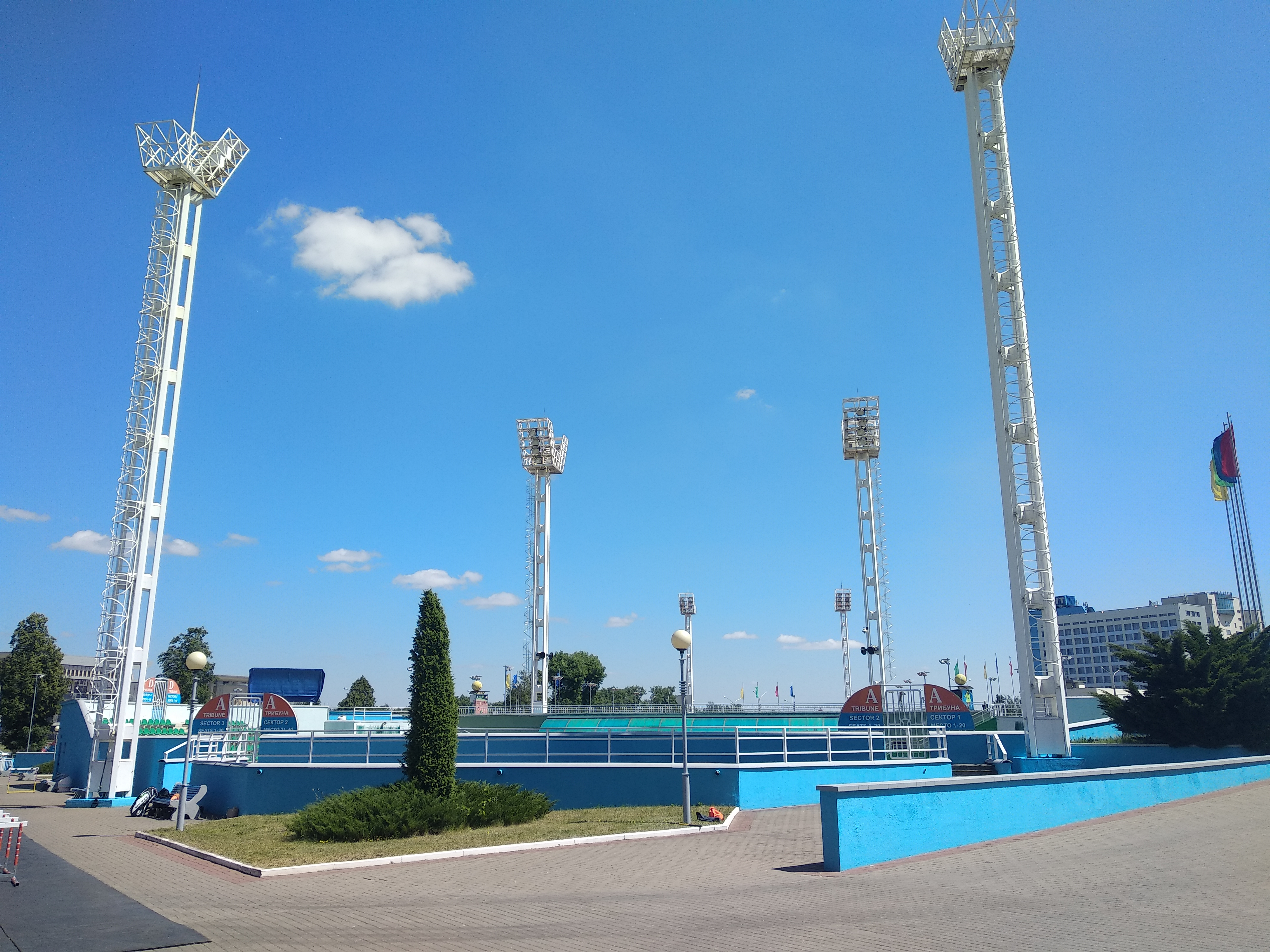 Рэспубліканскі цэнтр алімпійскай падрыхтоўкі па тэнісе, хардкорт